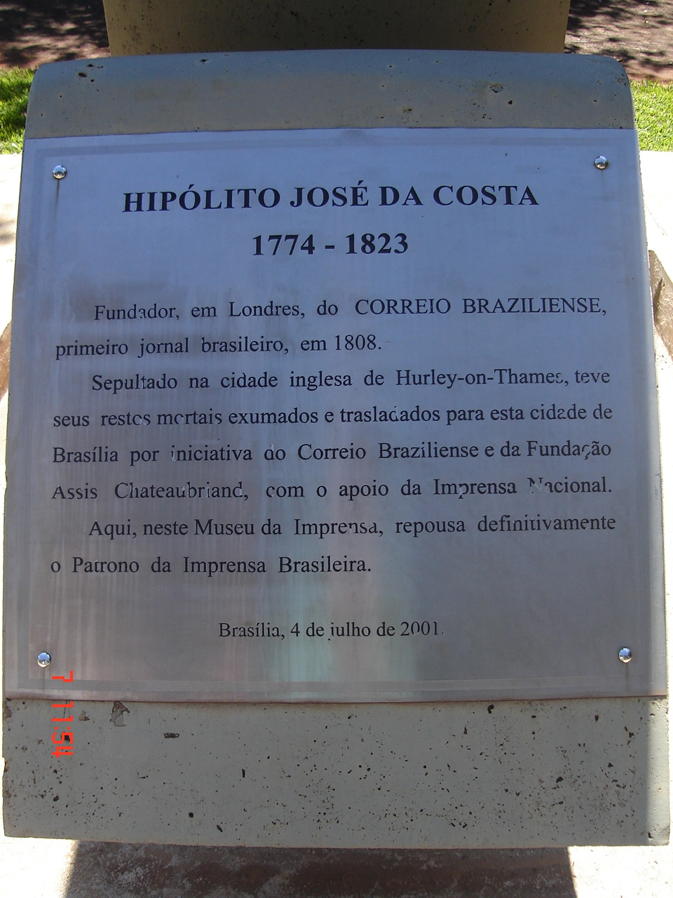 Lapide Hipólito José Costa